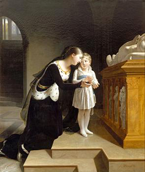 Peinture